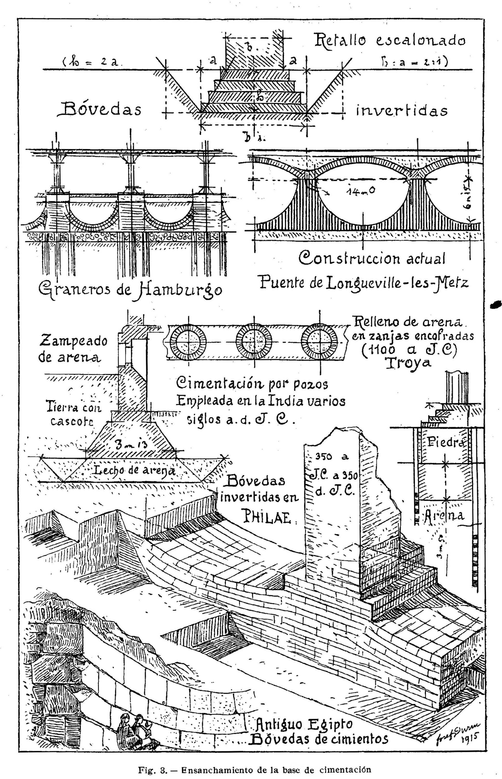 Ensanchamiento de la base de cimentación (textos del dibujo en español)